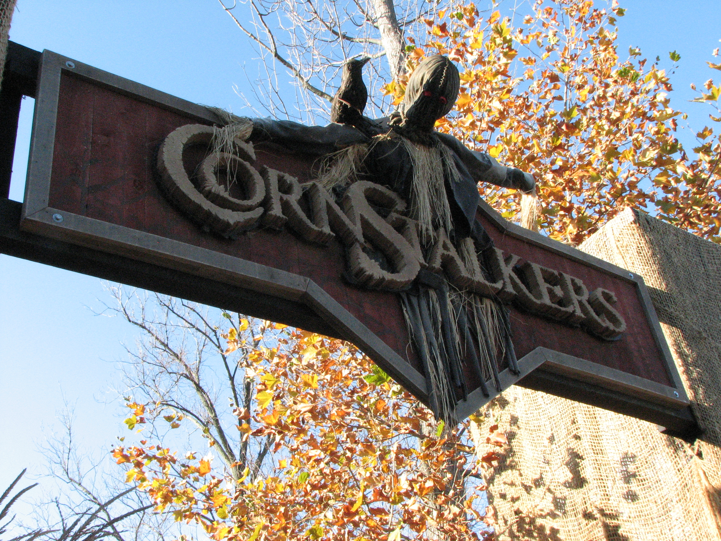 CornStalkers